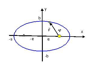 Елипса са значајним тачкама и дужима